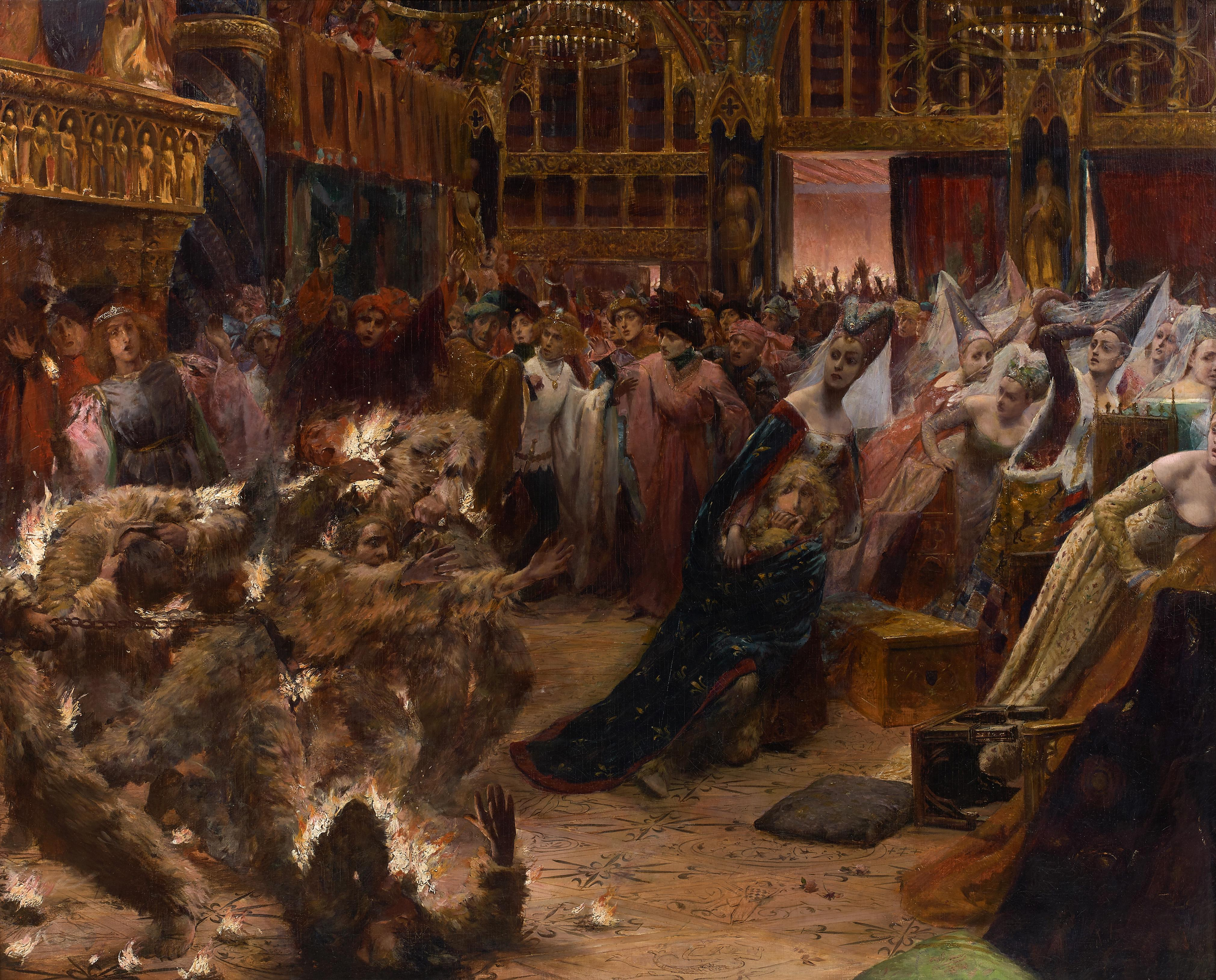 Le Bal des Ardents, huile/toile, 130 x 162 cm, exposée au Salon de 1889, préemptée par le Musée Anne-de-Beaujeu de Moulins lors de la vente Artcurial du 14 novembre 2017.